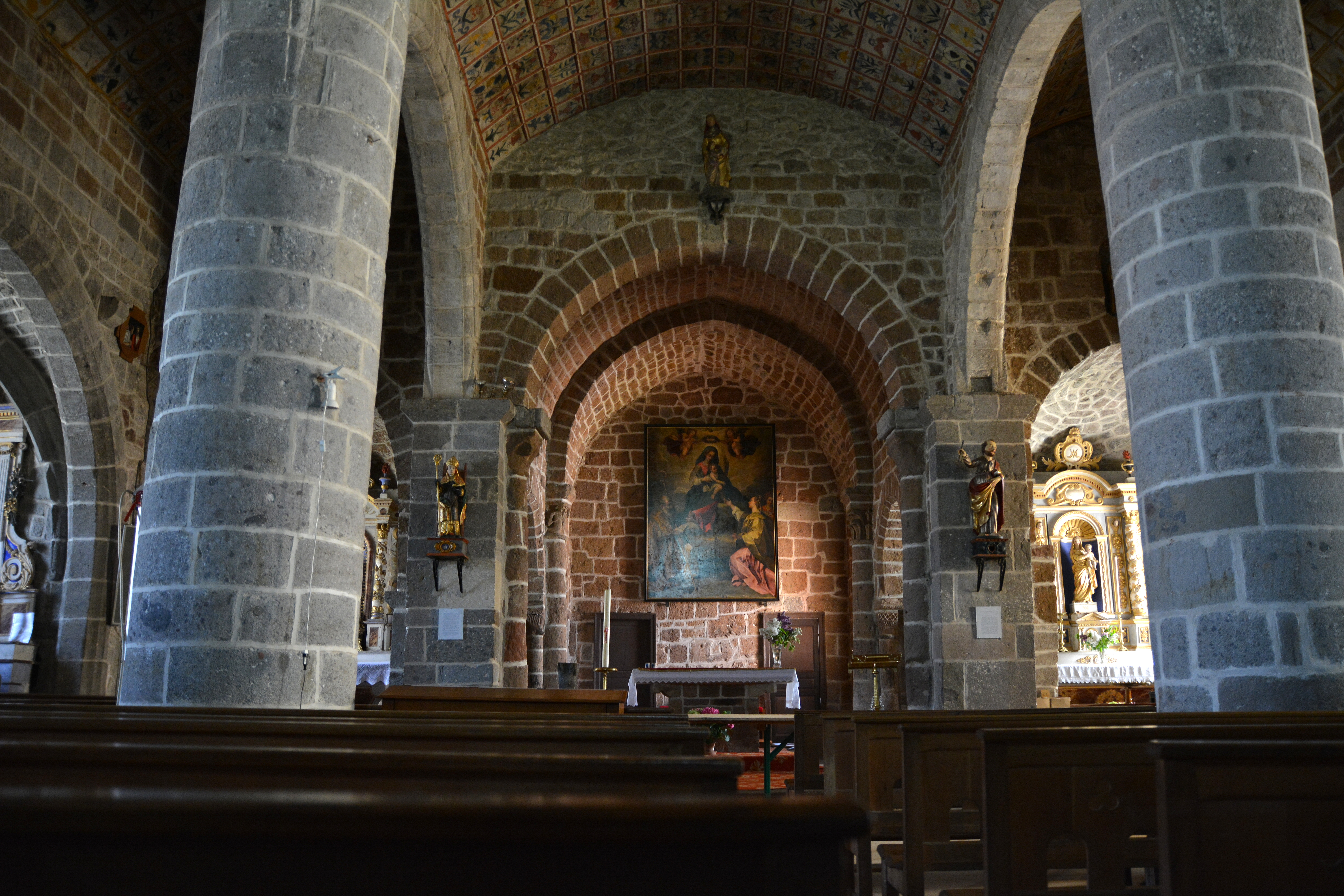 Vue intérieure Église Saint-Léger de Cheylade, Cantal, Auvergne, France